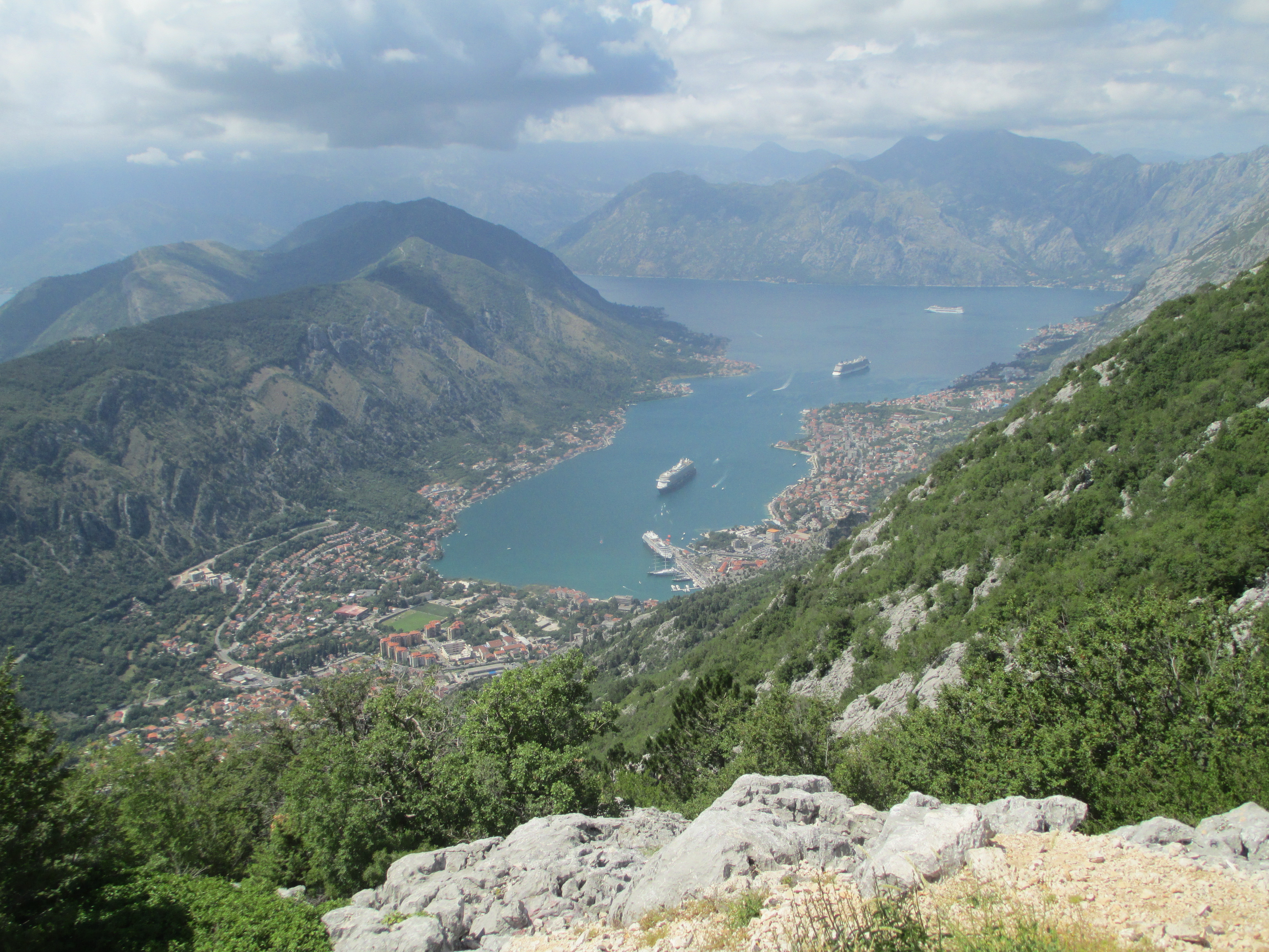 מפרץ קוטור